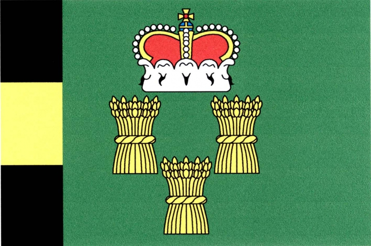 Vlajka, Číčenice, okres Strakonice